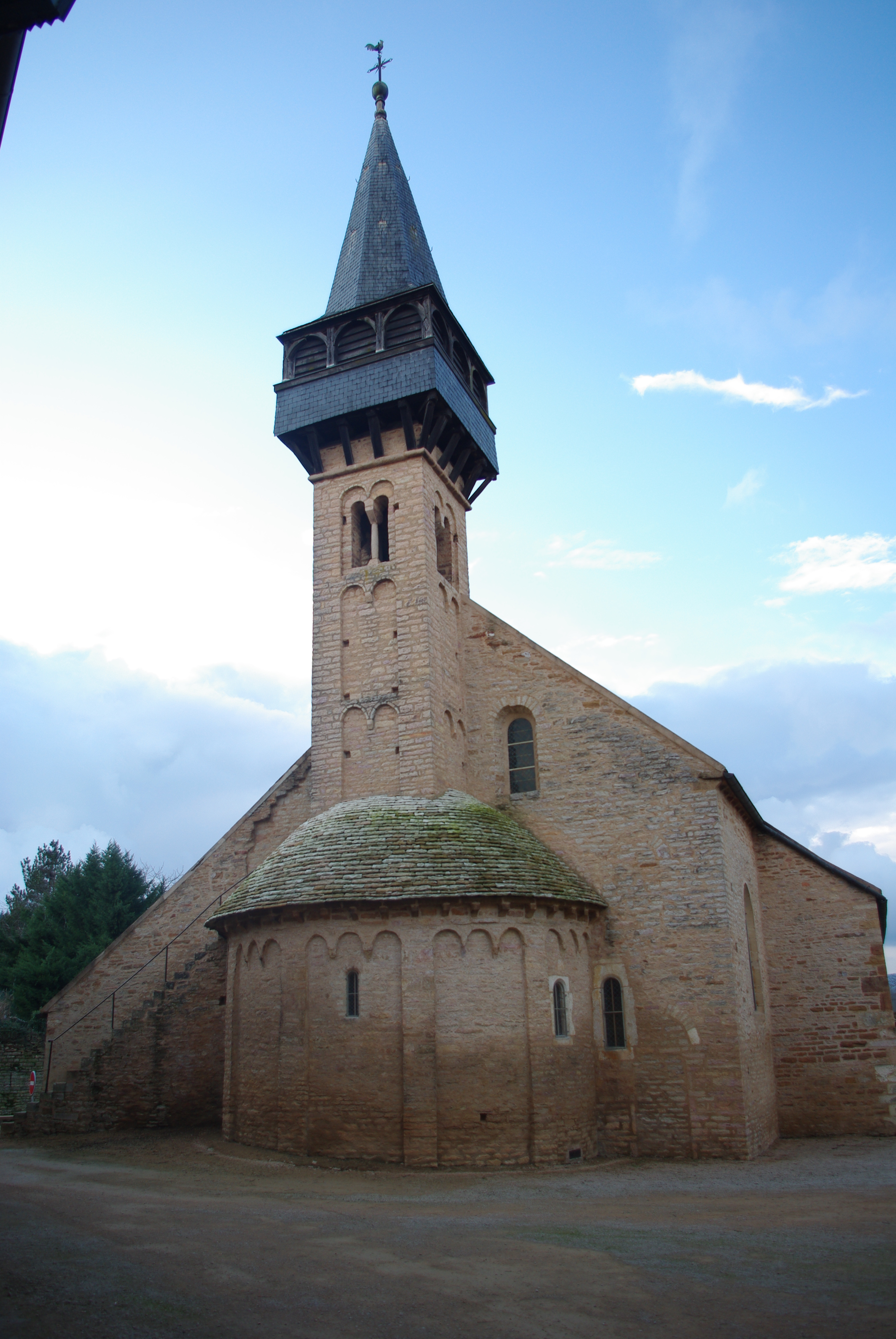 Vue globale de l'église de Laizé, Saône-et-Loire, France